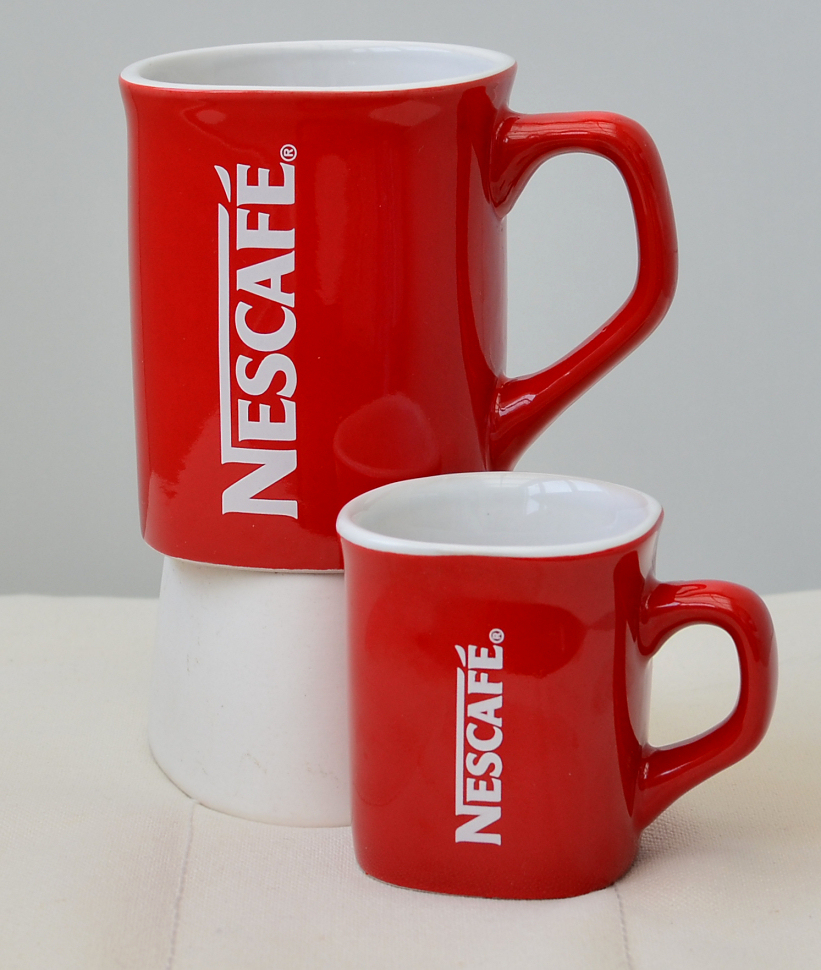 Nescafe Tassen